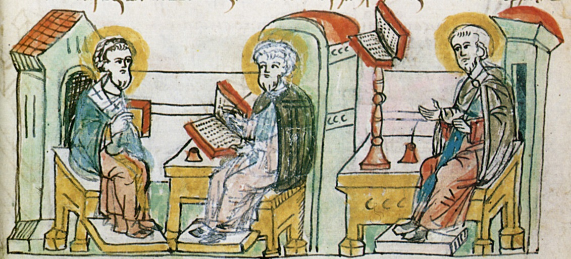 Radziwiłł-Chronik, Fol. 14r, Detail: Übersetzungs- und Schreibarbeiten unter der Leitung von Method Text aus der Radziwiłł-Chronik: "Method aber setzte 2 Priester, vortreffliche Schnellschreiber, hin und übersetzte die Heilige Schrift vollständig aus der griechischen Sprache in die slawische in sechs Monaten, angefangen von Monat März bis zum 12. Oktober."(Graßhoff, Freydank, Sturm: Rauchspur der Tauben. Radziwiłł-Chronik, S. 38)